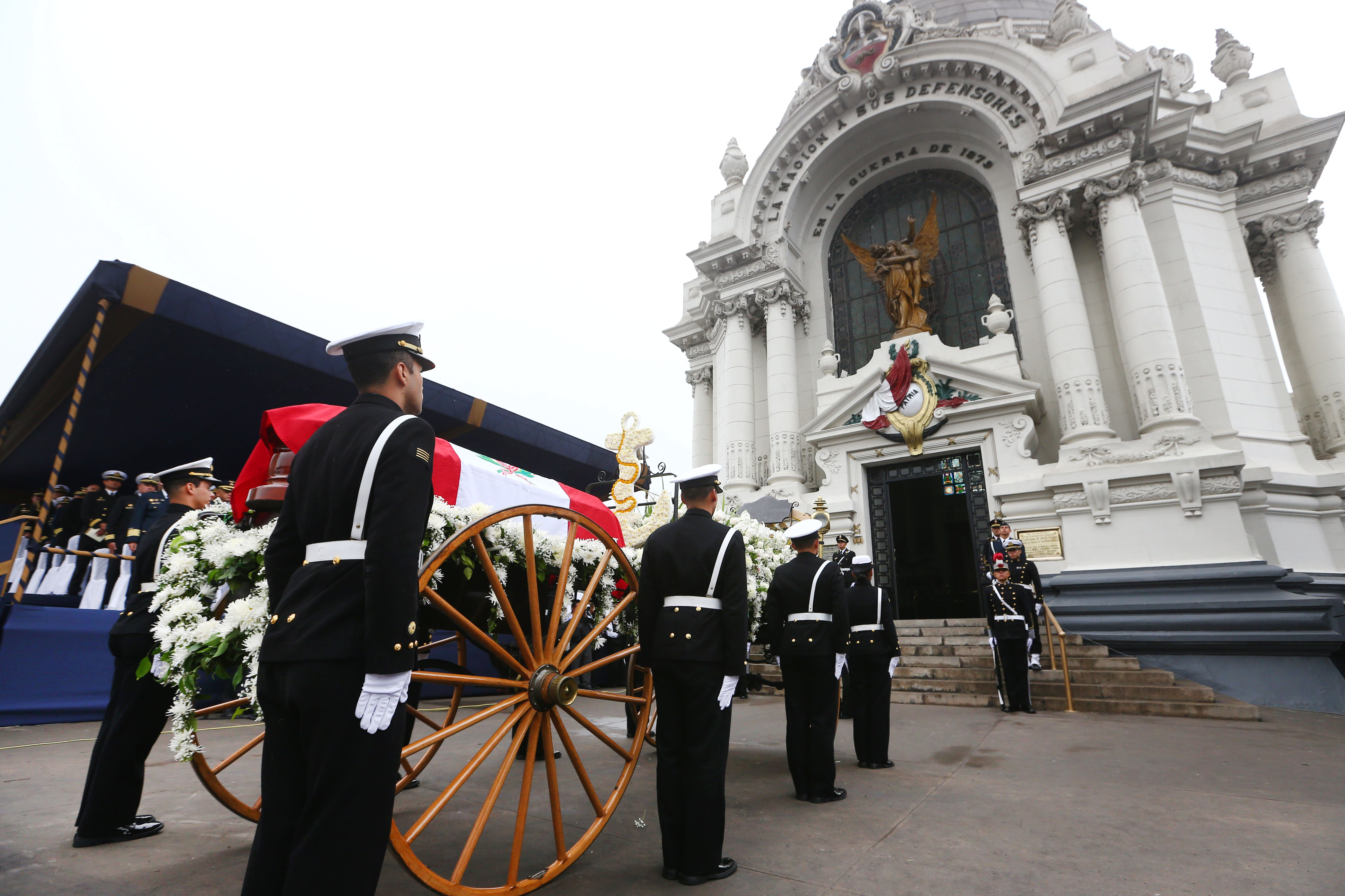 Héroe Nacional participó en el Combate Naval de Abtao y la Guerra del Pacífico. El ministro de Defensa, Jorge Nieto, presidió ceremonia de inhumación en el Cementerio Presbítero Maestro. A partir de hoy los restos mortales del Contralmirante (F) Manuel Villar Olivera, insigne marino que participó en las Campañas Navales de la Independencia, el Combate de Abtao y la Guerra del Pacífico, reposan en la Cripta de los Héroes, ubicada dentro del Museo Cementero General Presbítero Matías Maestro, en el cercado de Lima.